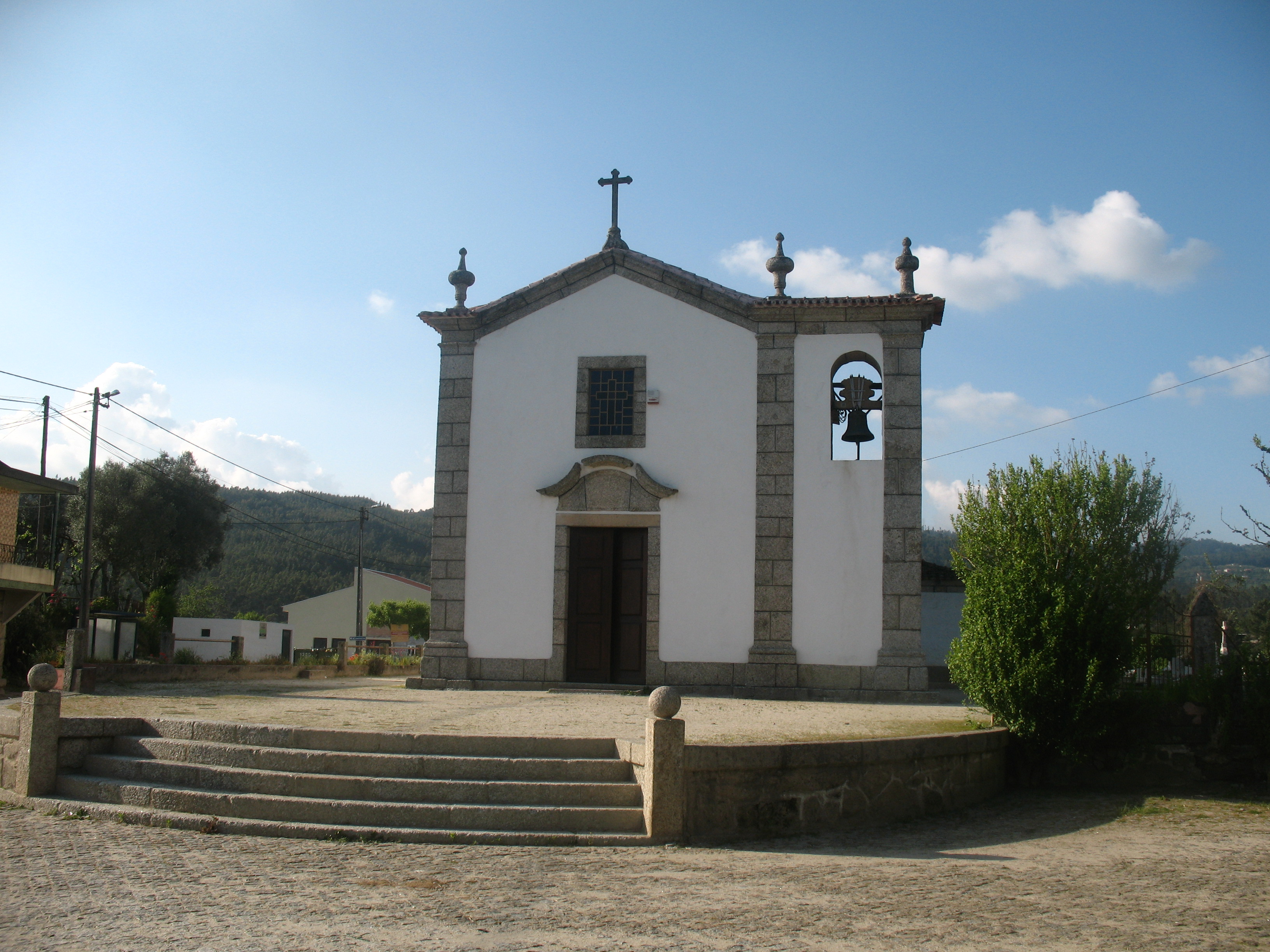 Amarante Aboim Igreja Matriz